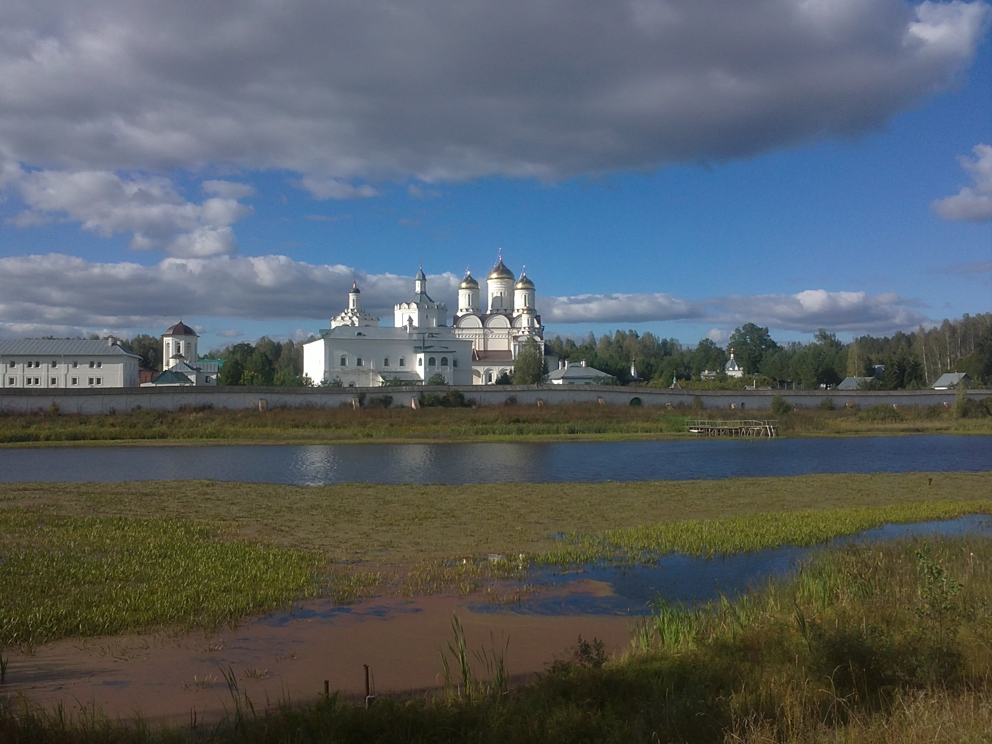 Монастырь Троицкий (руины Болдинского монастыря) (Смоленская область, Дорогобуж, село Болдино)